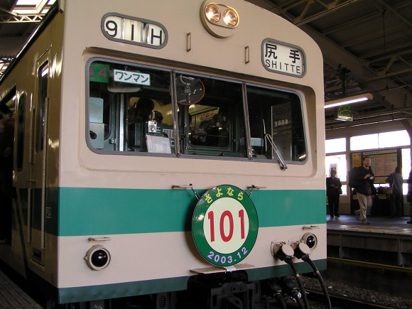 さよならヘッドマークをつけた国鉄101系電車。2003年12月14日に鶴見駅にて行われたさよならイベントにて投稿者が撮影しました。